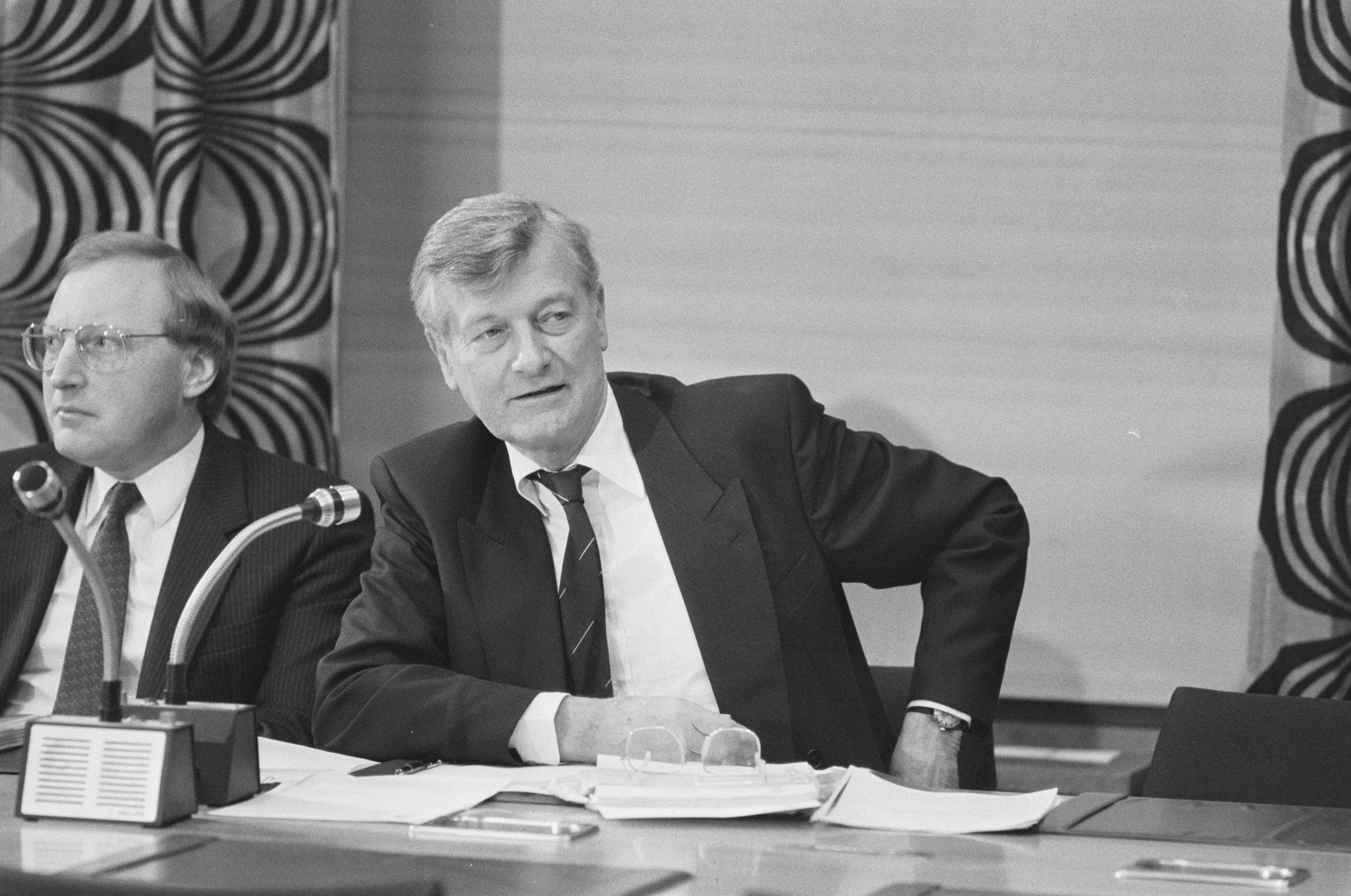 Collectie / Archief : Fotocollectie Anefo Reportage / Serie : [ onbekend ] Beschrijving : Kamercommissie onderzoek "Grijze Viscircuit" ; minister De Koning Datum : 8 april 1987 Trefwoorden : Kamercommissies Persoonsnaam : Koning, Jan de Fotograaf : Bogaerts, Rob / Anefo Auteursrechthebbende : Nationaal Archief Materiaalsoort : Negatief (zwart/wit) Nummer archiefinventaris : bekijk toegang 2.24.01.05 Bestanddeelnummer : 933-9471